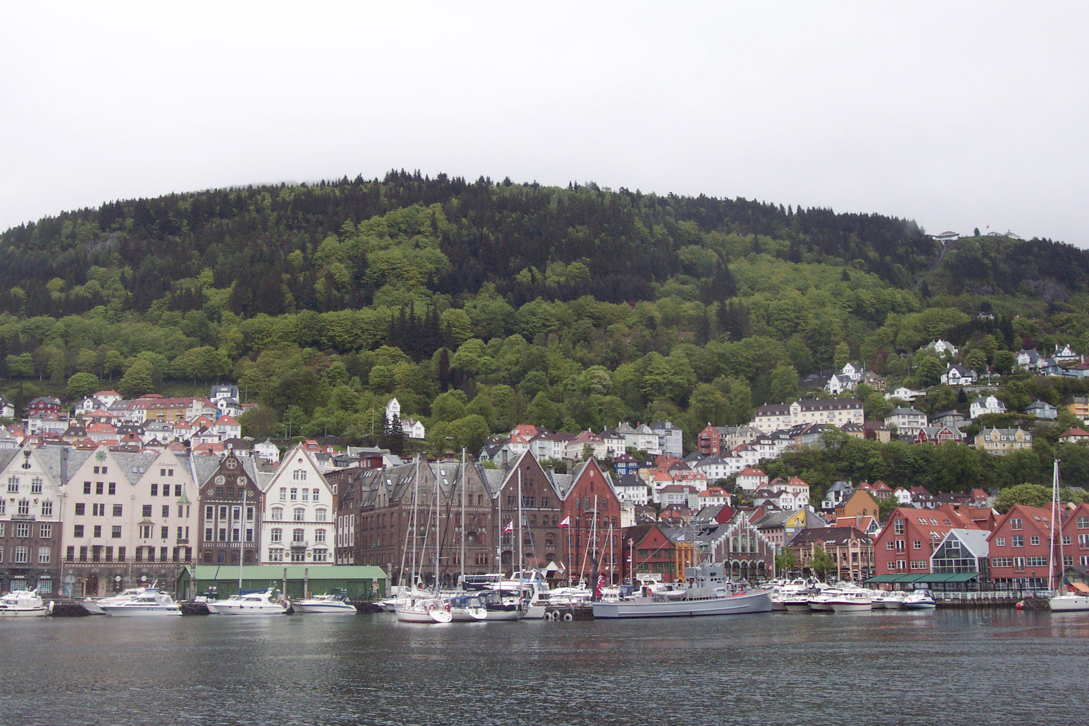 Description = Bergen (Norvège). Le quartier de Bryggen, et en arrière plan, le mont Floien. Source =Photo taken by Remi Jouan Date =Mai 2004 Author =Remi Jouan